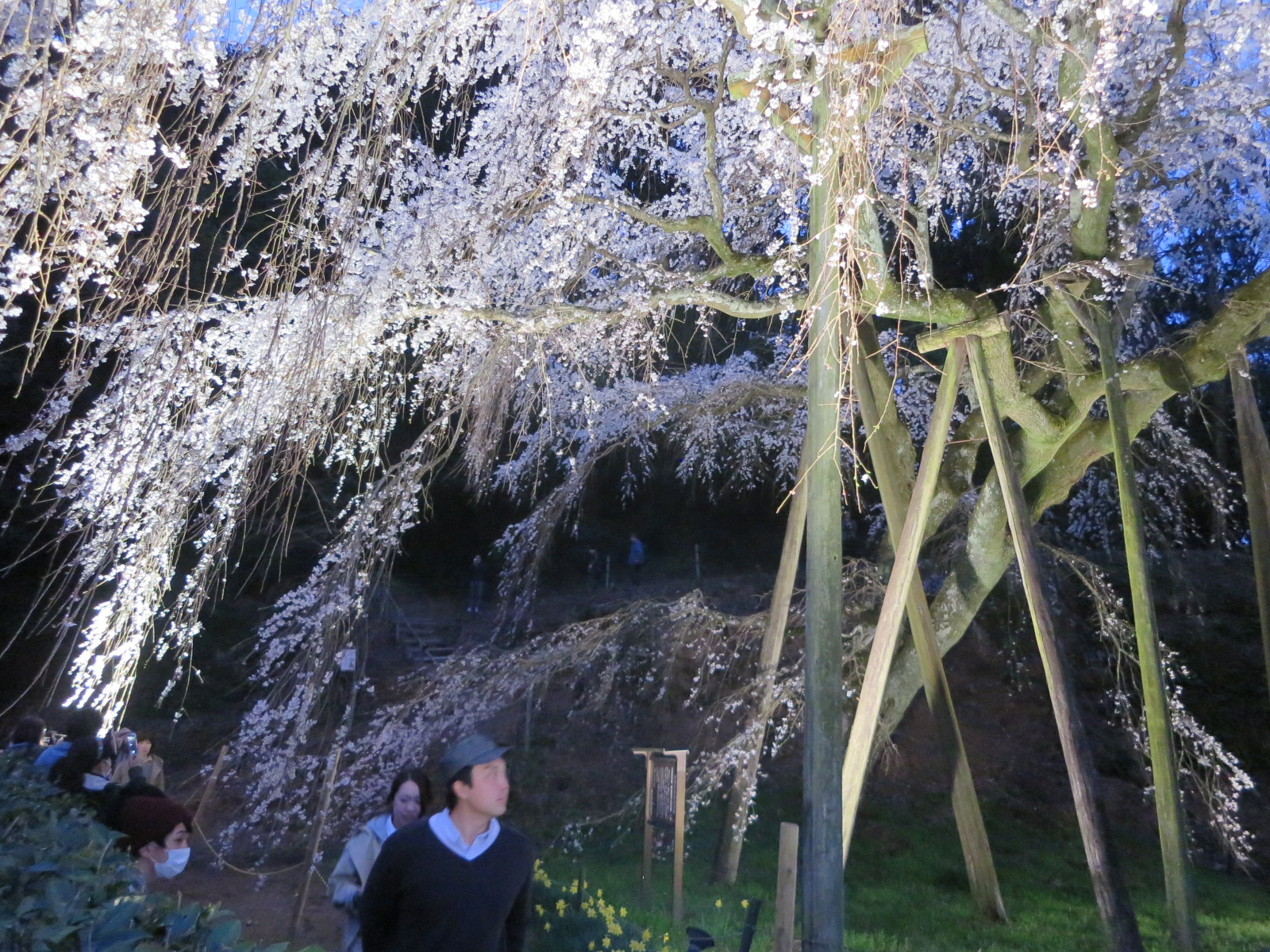 奥山田のしだれ桜（愛知県岡崎市）